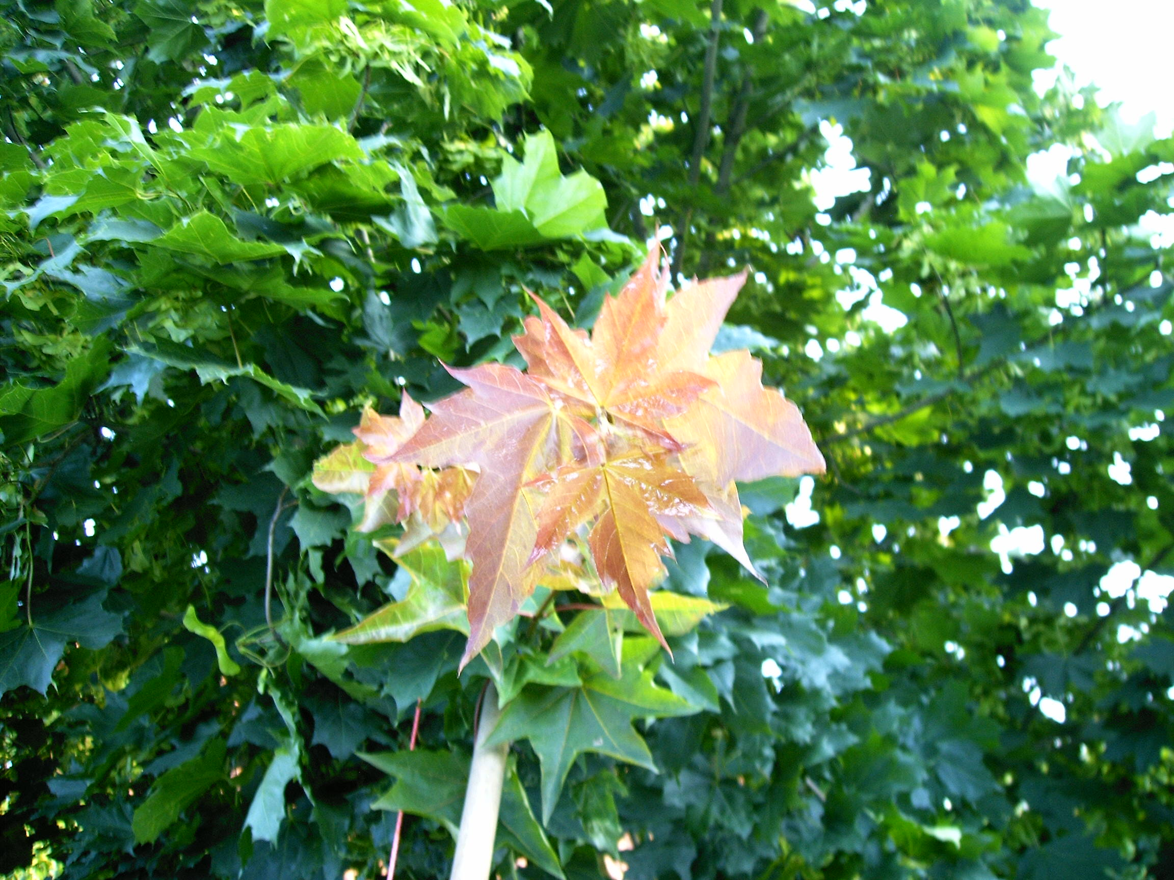 Anthozyane färben junge Ahornblätter zum Schutz vor UV-Licht